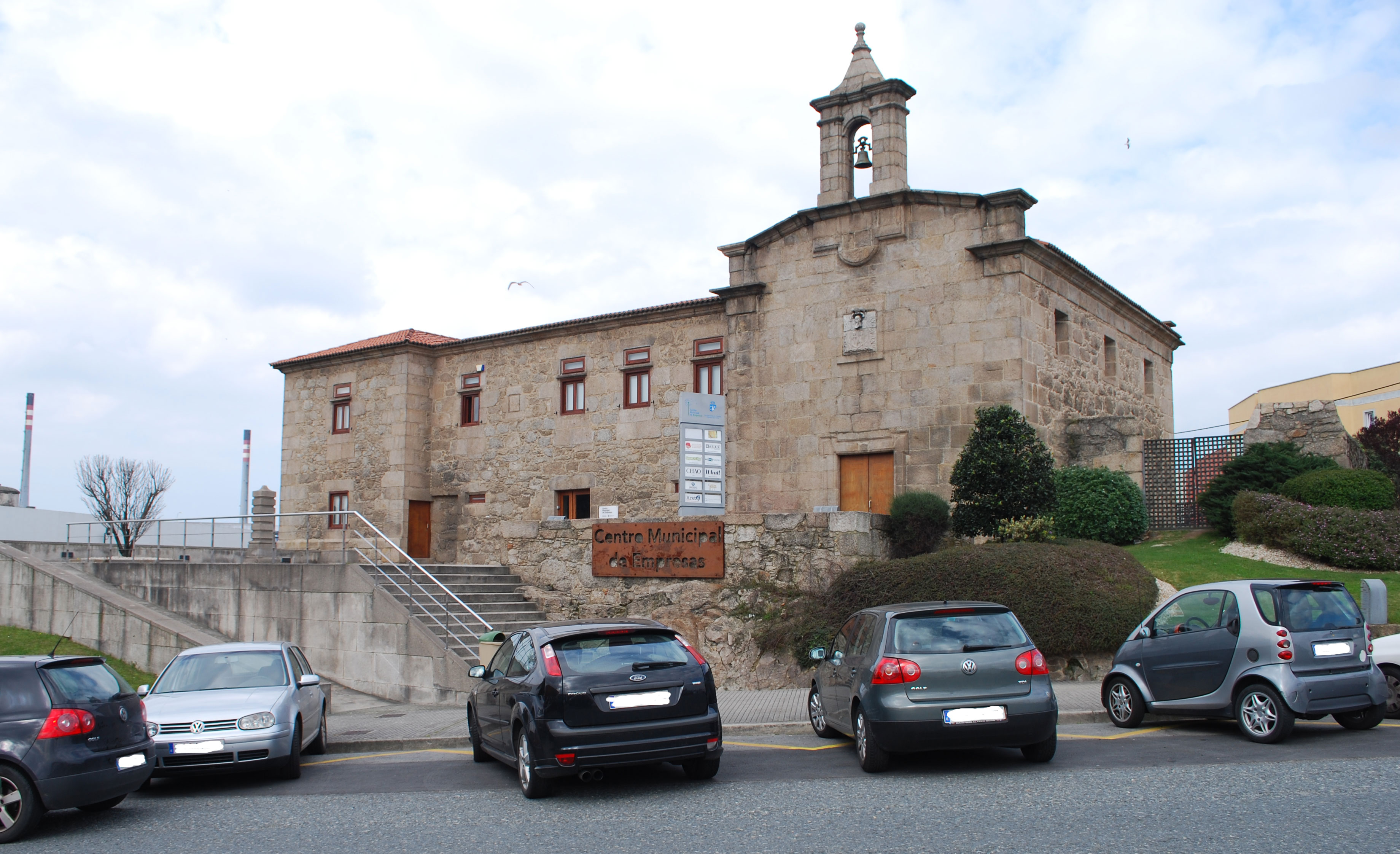 Agrela Centro de Negocios A Coruña Galiza Spain